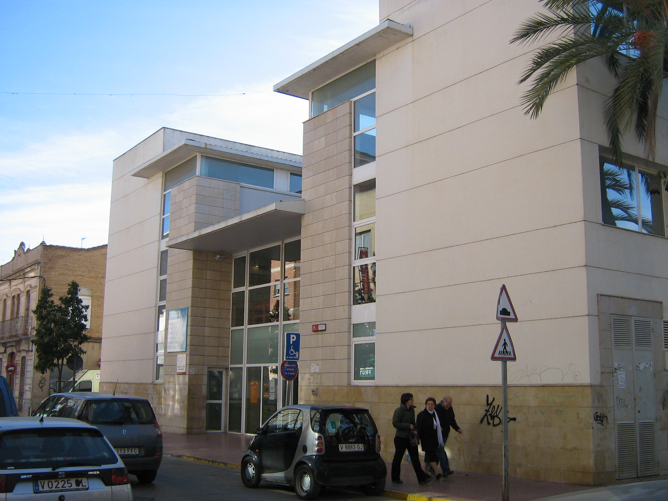 Centro de Saud de Benetússer